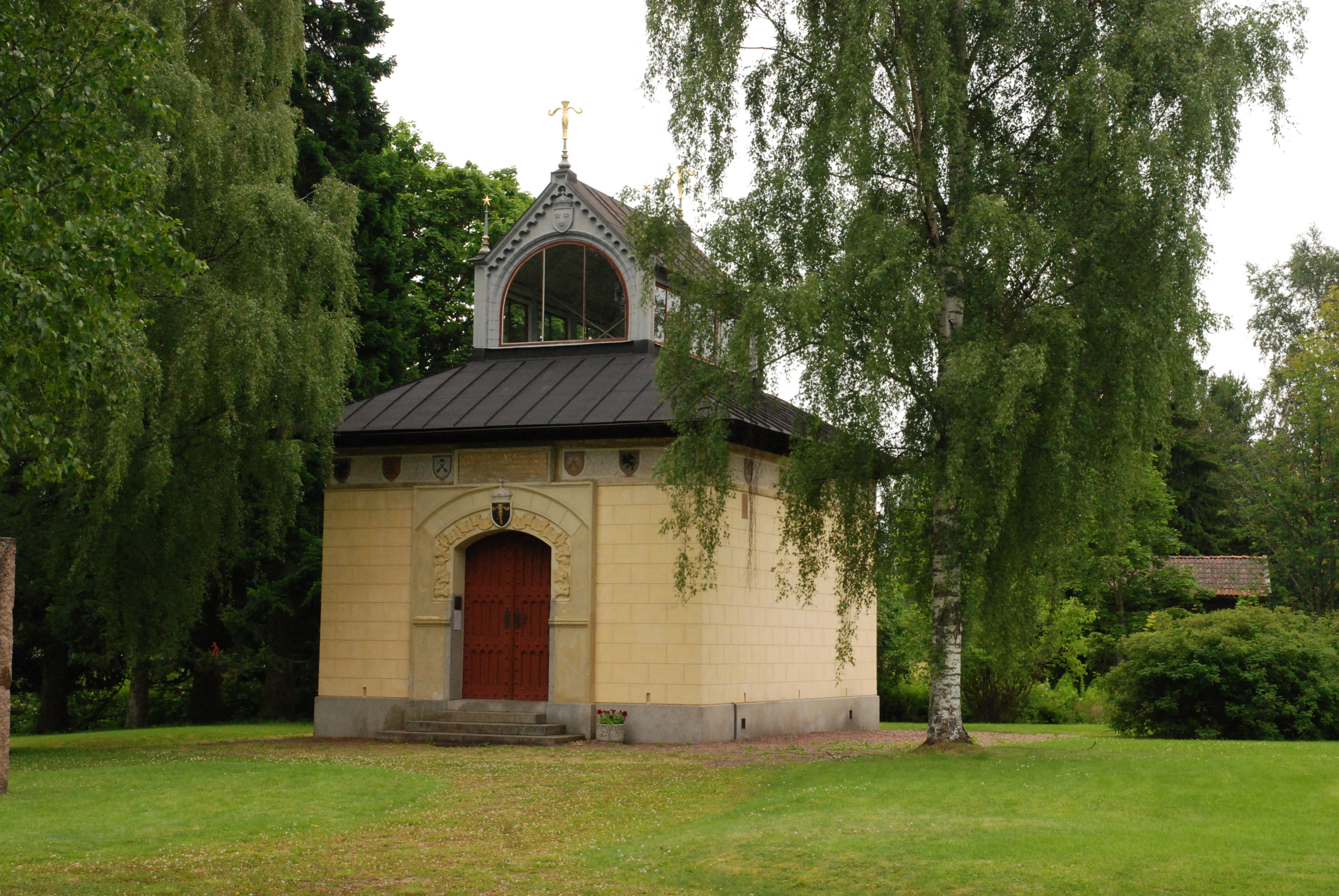 Foto av Utmelandsmonumentet i Mora. Fotot taget snett framifrån huvudingången.